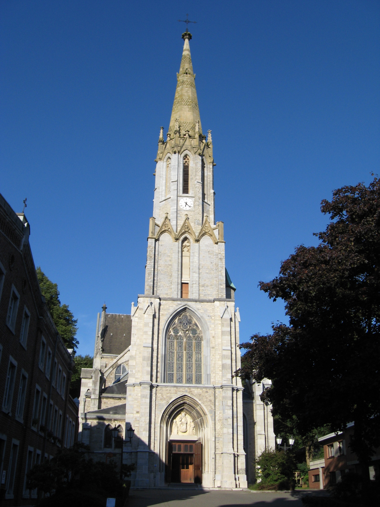 Sint-Jozefkerk in Eupen